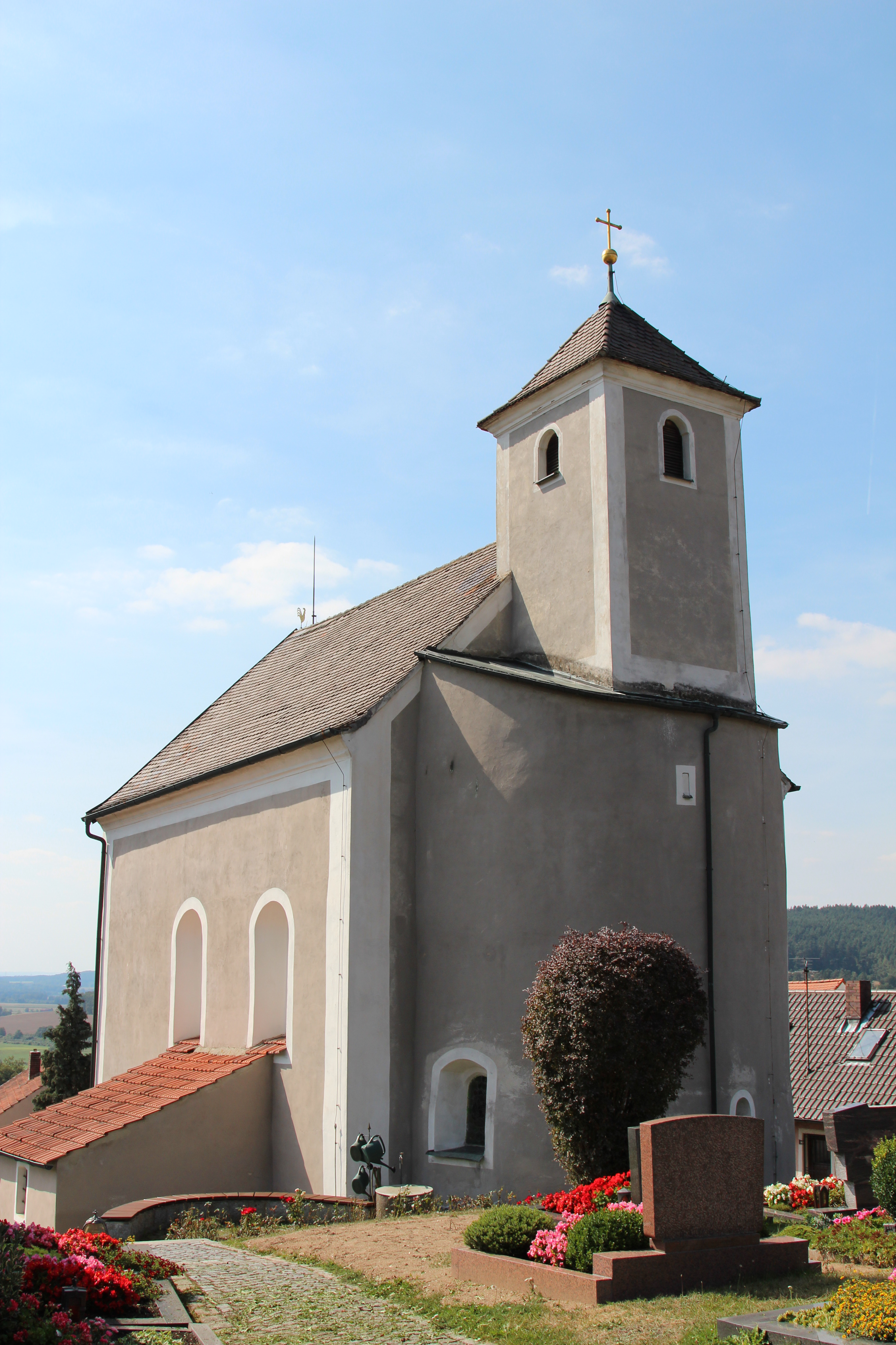 Bartholomäuskirche in Altfalter, Gemeinde Schwarzach bei Nabburg, Landkreis Schwandorf, Oberpfalz, Bayern; Diese Kirche war die erste Kirche in Altfalter und wurde im 13. Jahrhundert errichtet.